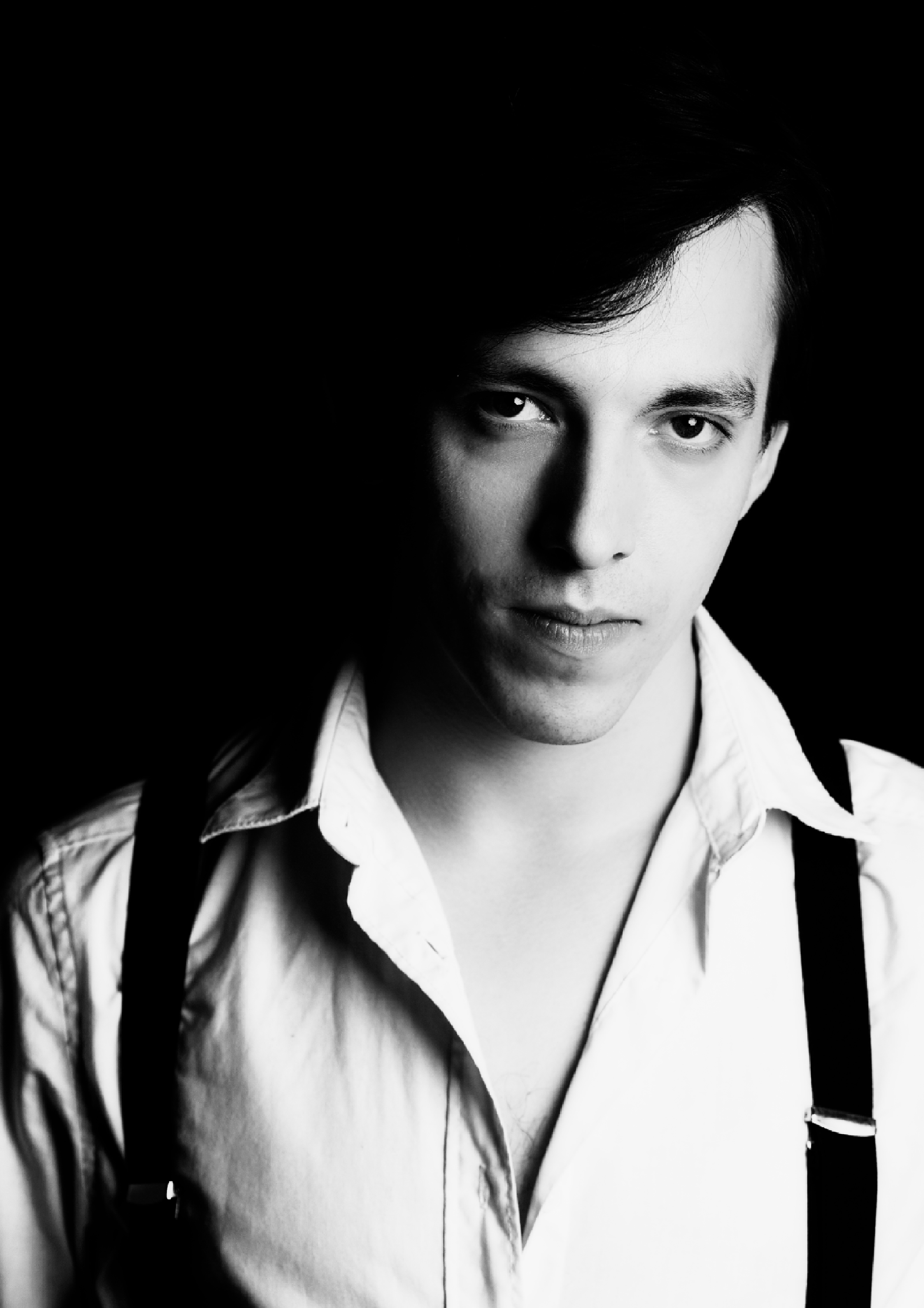 Das Plakatmotiv zu seinem neuen Programm "Ageschminkt". Premiere 2017